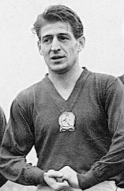 Czibor Zoltán olimpiai bajnok és világbajnoki ezüstérmes magyar labdarúgó, az aranycsapat tagja.